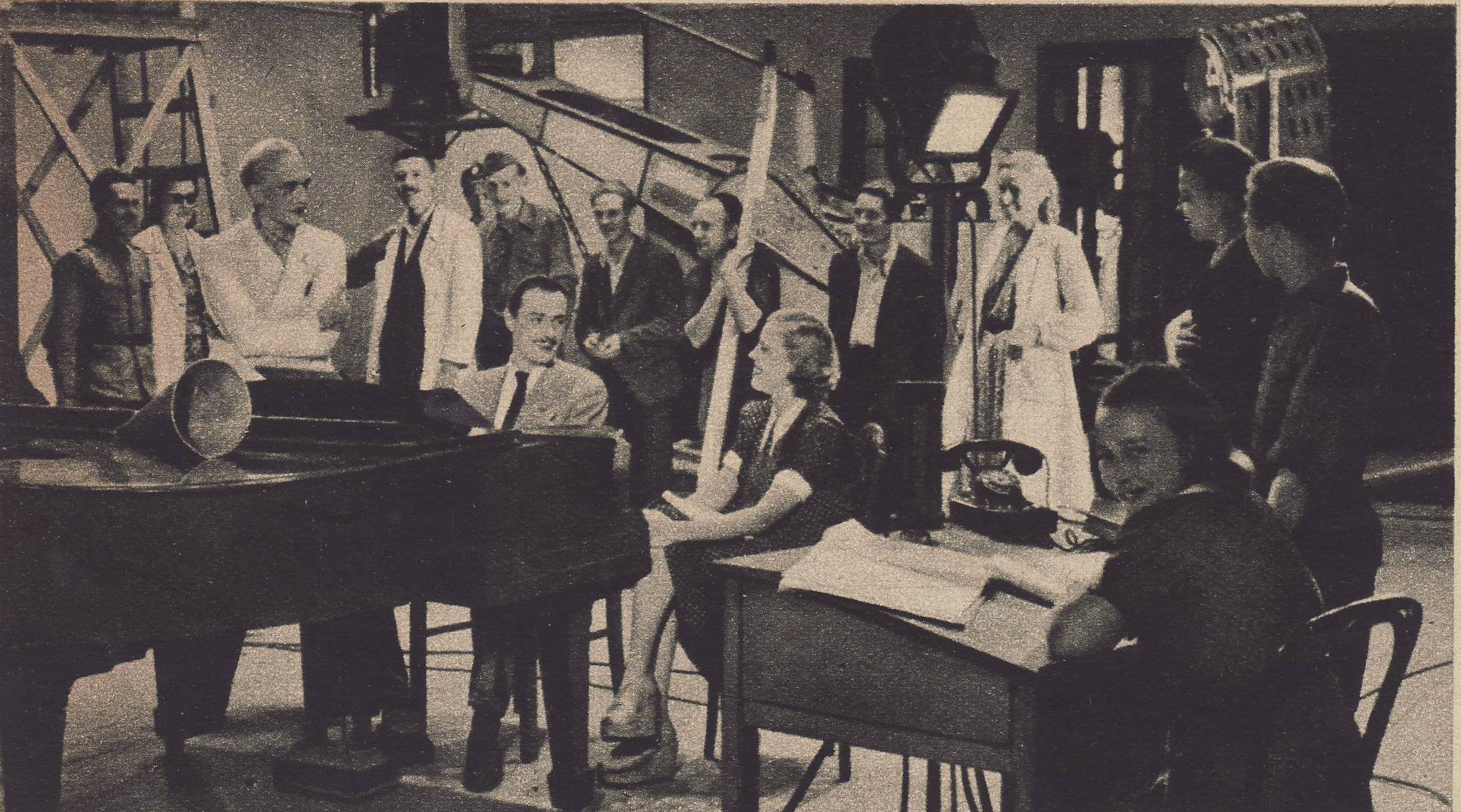 Kadr z filmu fabularnego Zakazane Piosenki nakręconego w 1946 roku w zburzonej Warszawie.